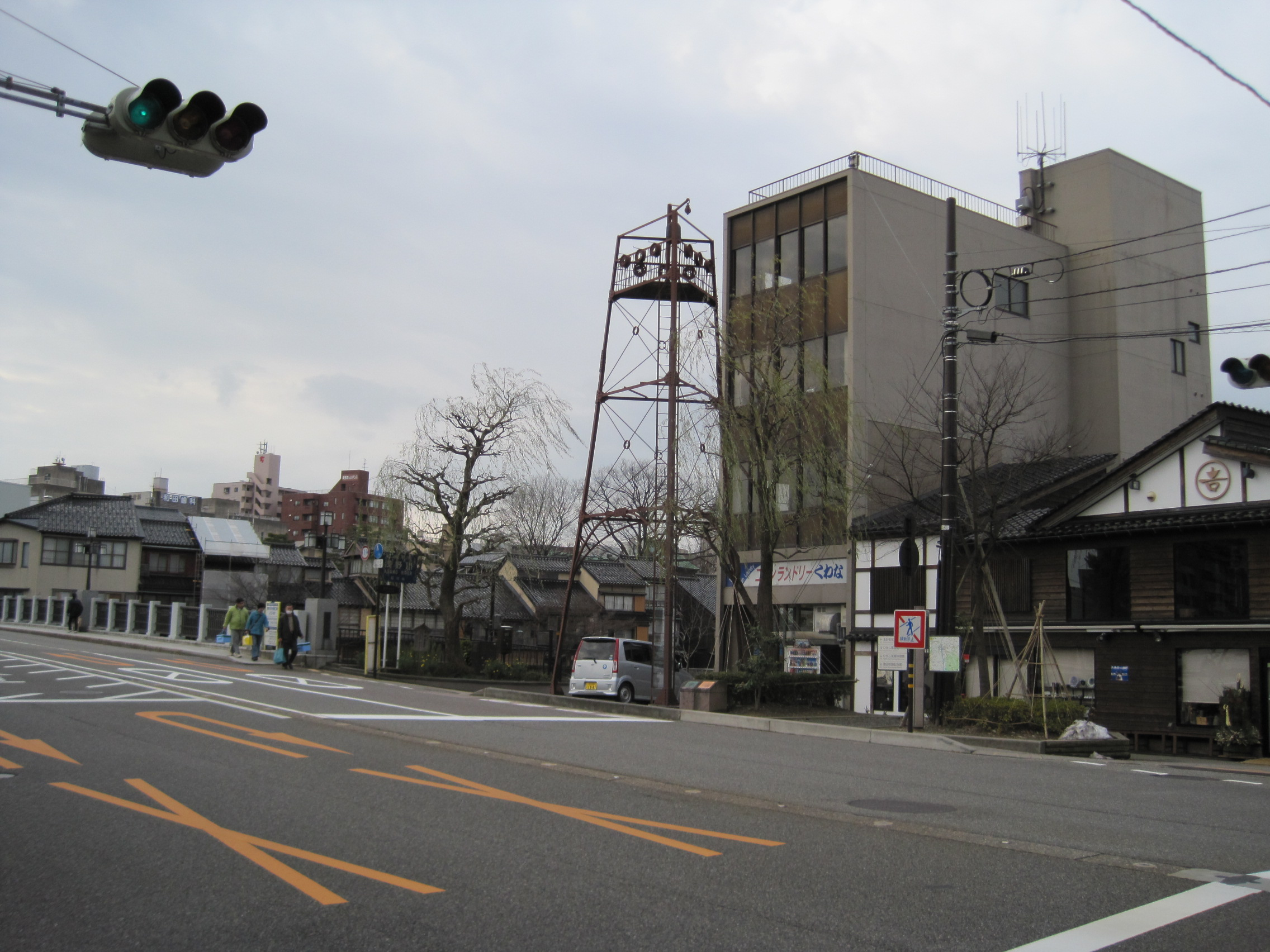 浅野川大橋北側にある「火の見櫓」。浅野川大橋と同様に登録有形文化財となっている。